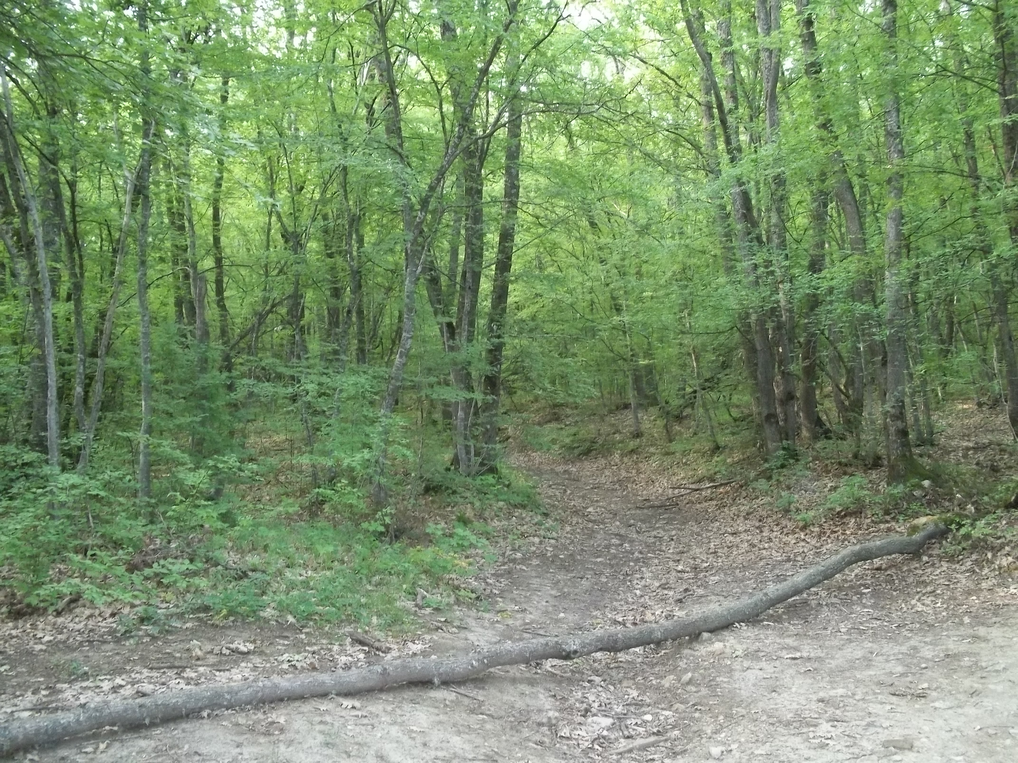 склон горы Кара-Тау